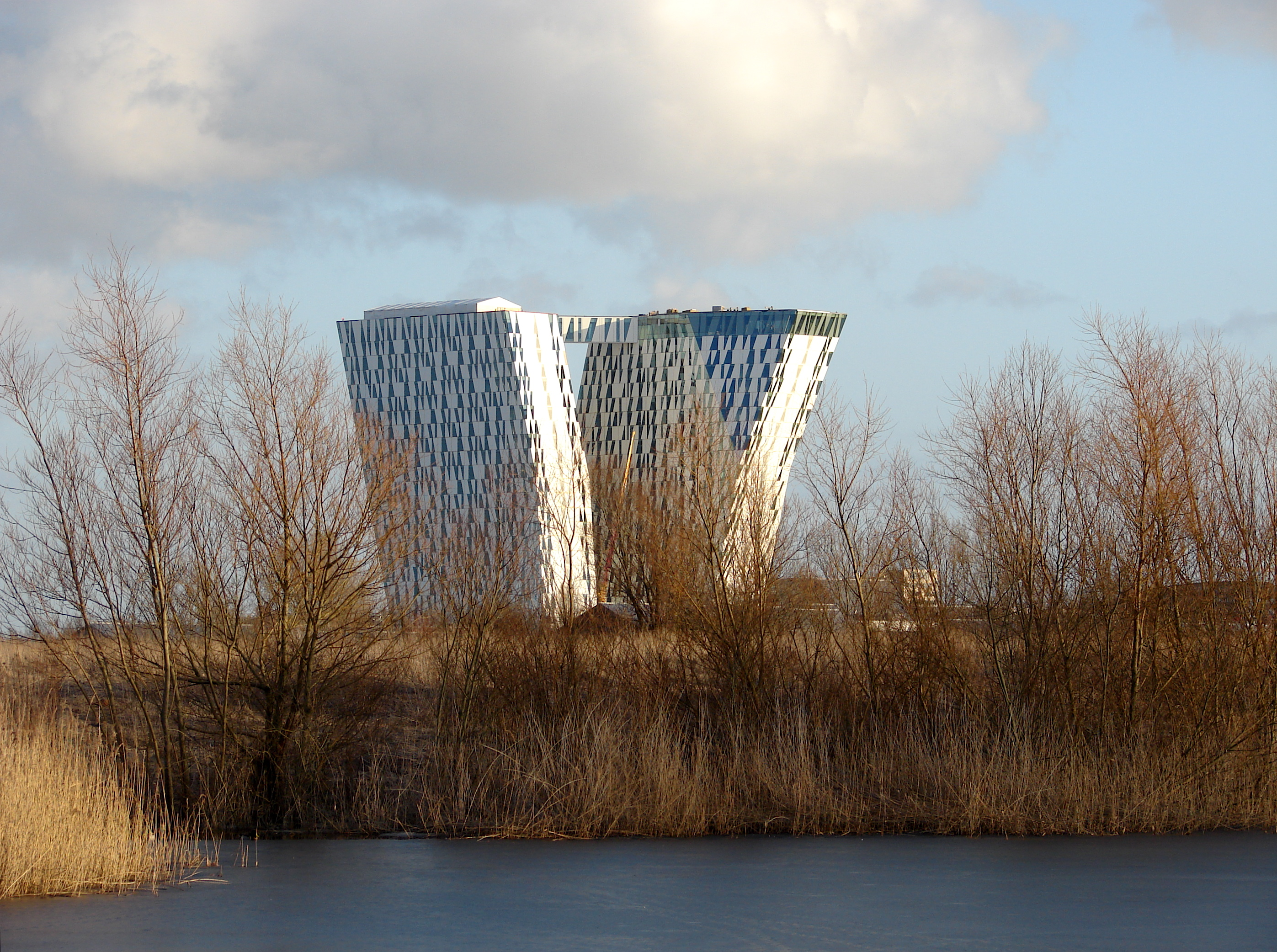 Bella Sky, Ørestad, Amager ved København